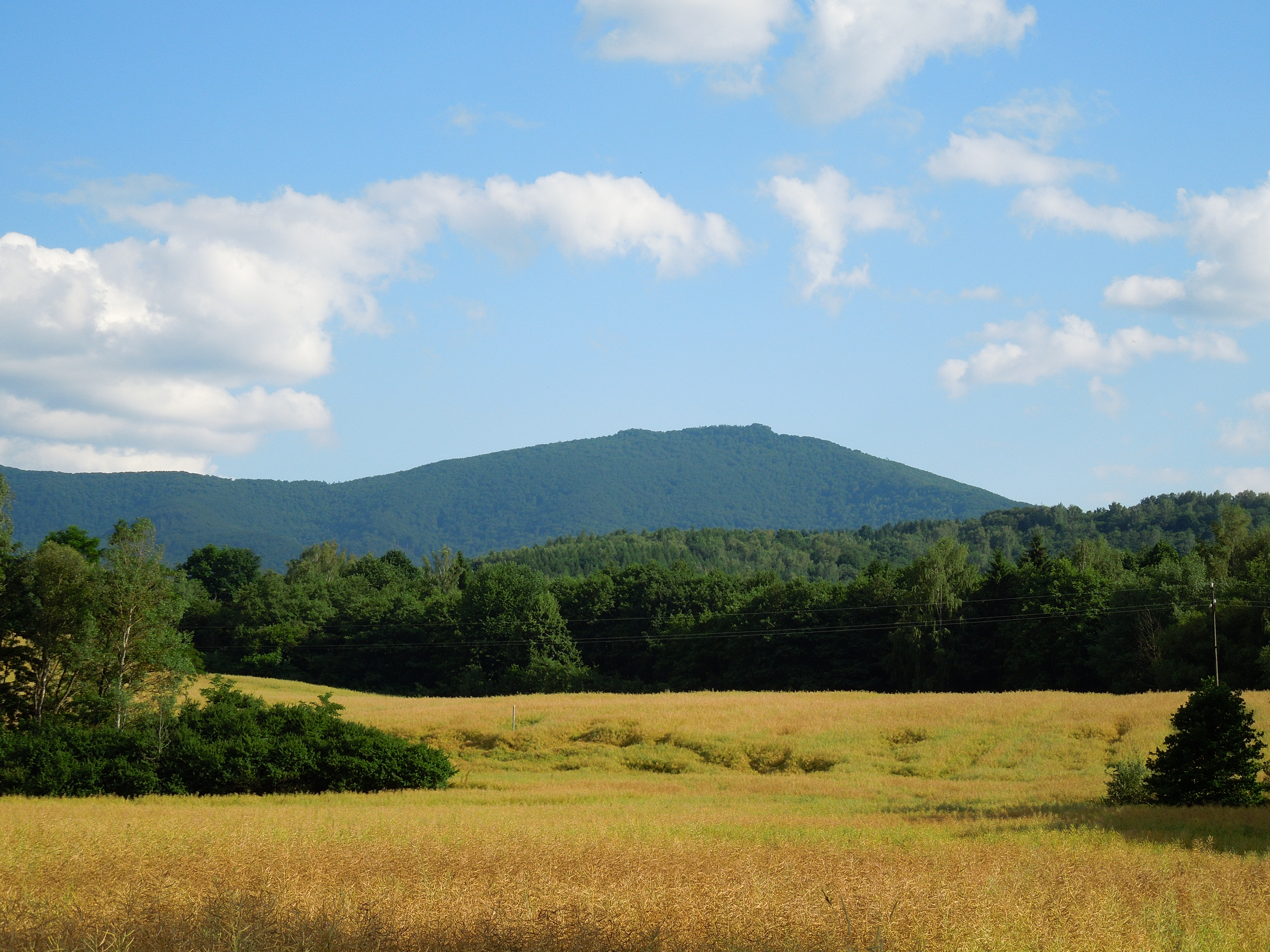 Pohľad na Sninský kameň z rekreačnej oblasti Sninské rybníky v lete This is a photography of Natura 2000 protected area with ID SKUEV0209